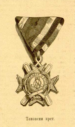 Die serbische Militärauszeichnung, Takovo-Orden